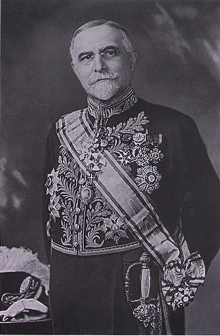 Fotografía del Embajador Daniel García-Mansilla